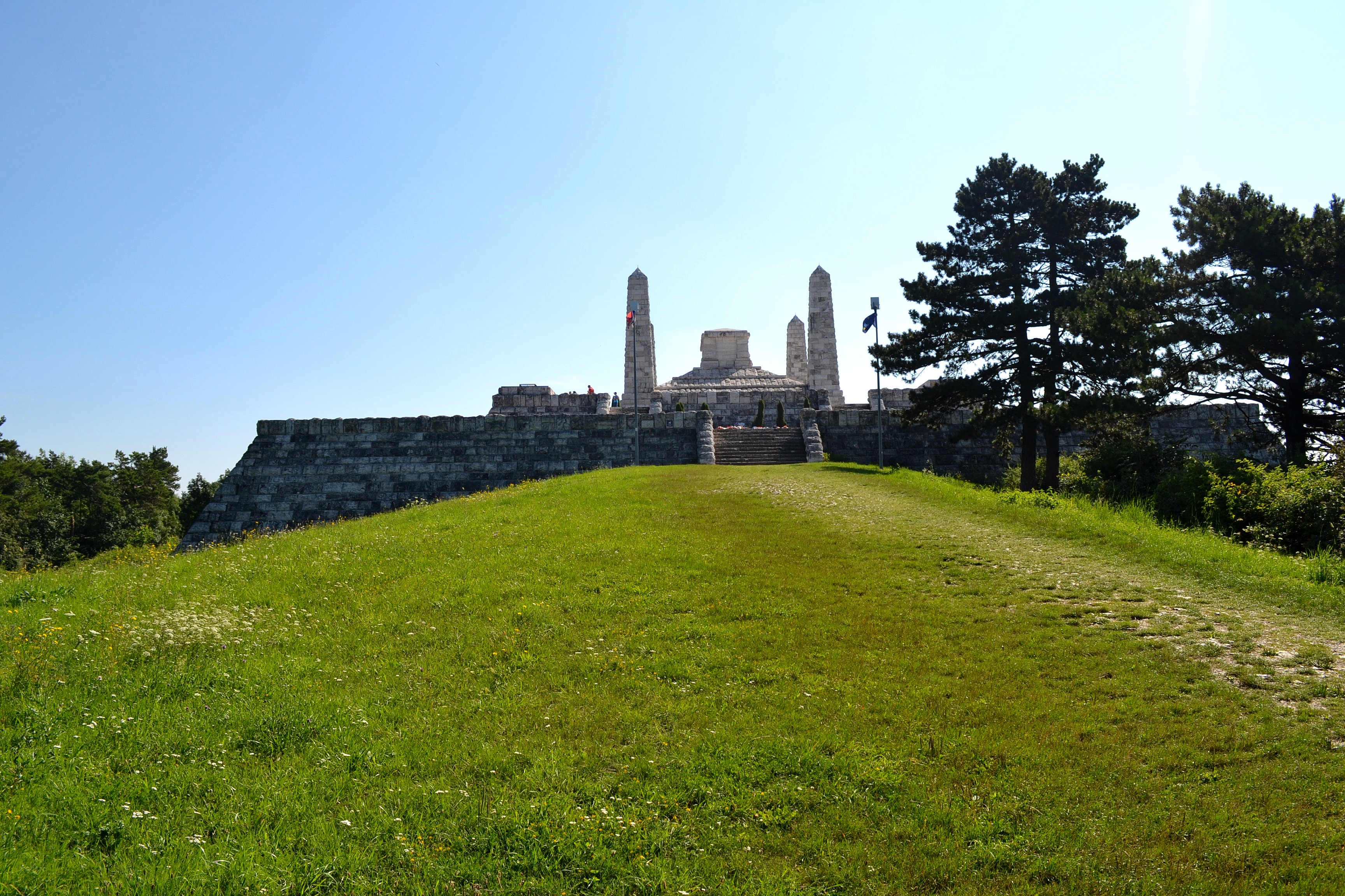 Čelný pohľad je zo západnej strany